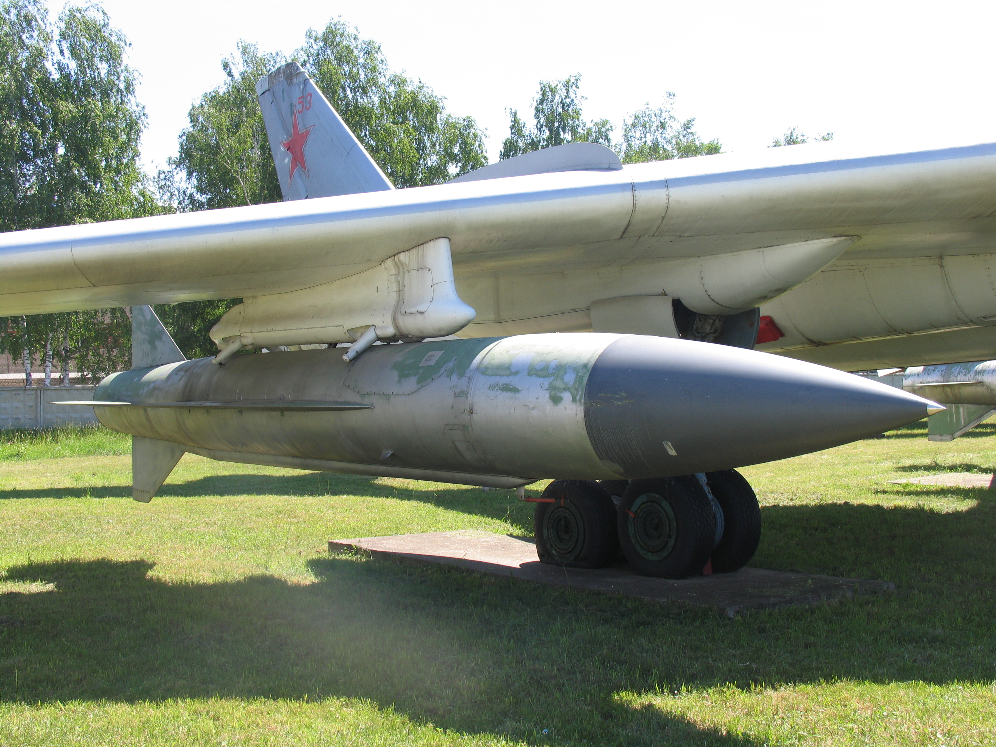 КСР-5 под крылом Ту-16. Центральный музей ВВС.